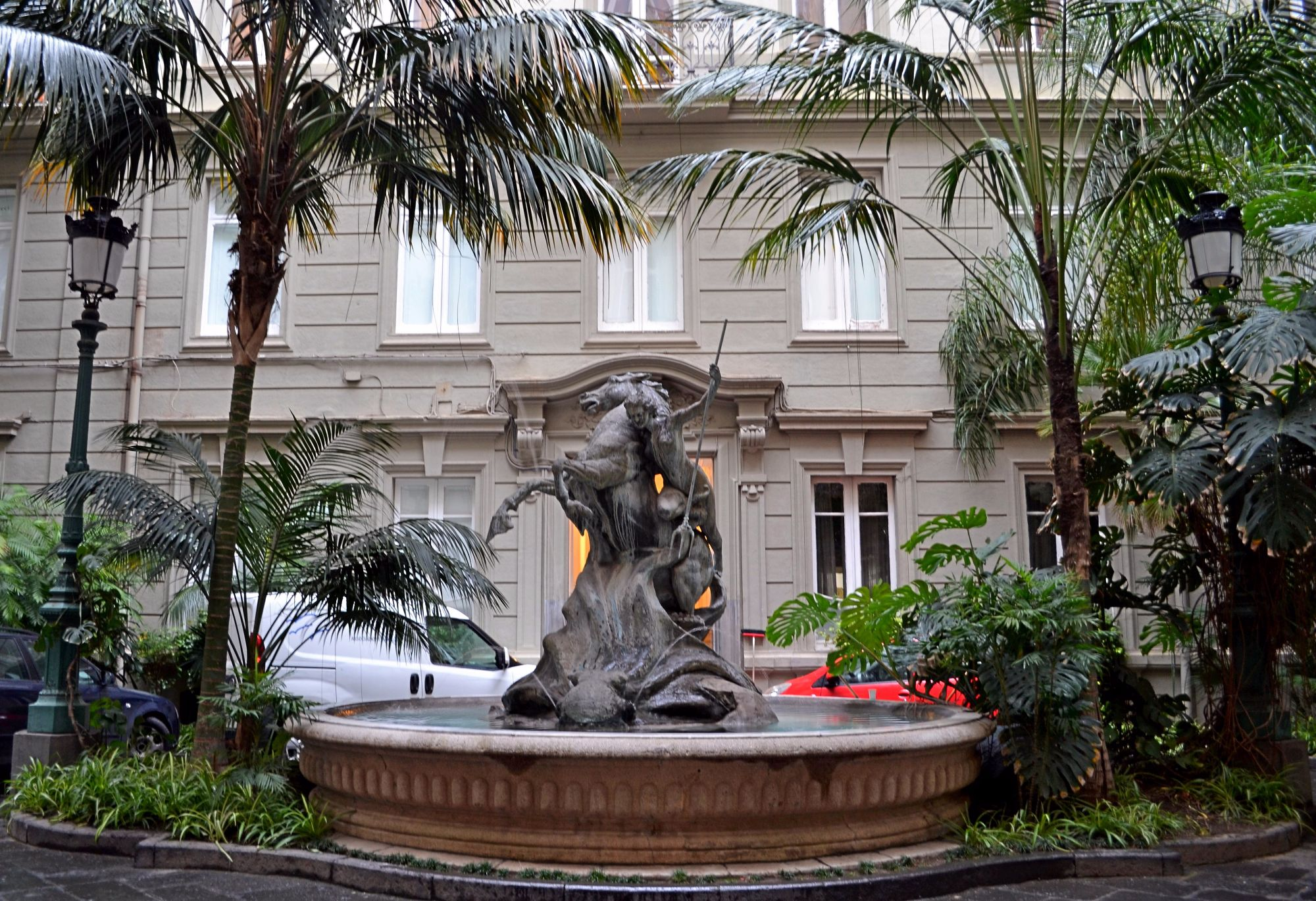 Palazzo Spinelli, Napoli autore: Giuseppe Guida